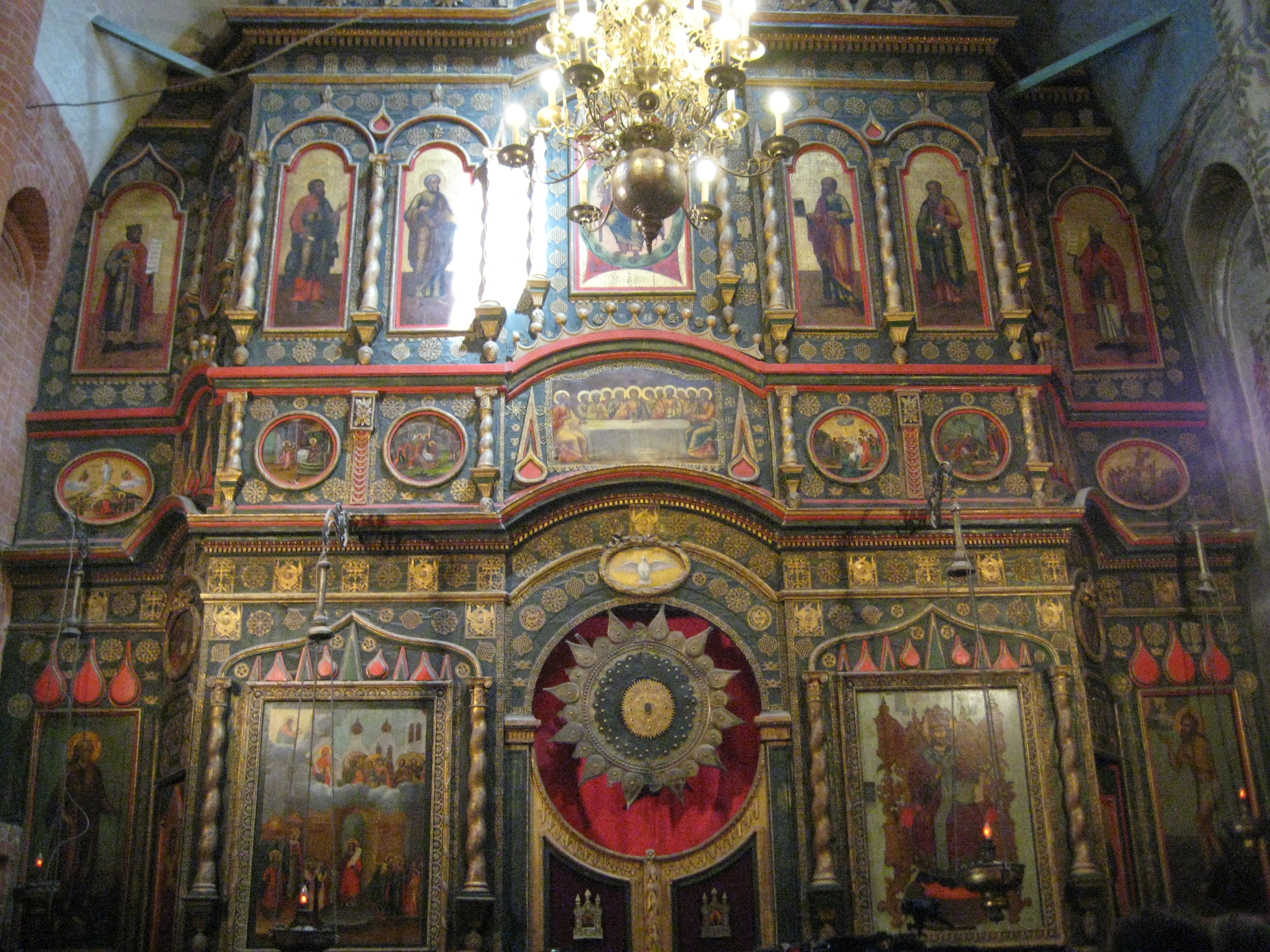 Собор Василия Блаженного